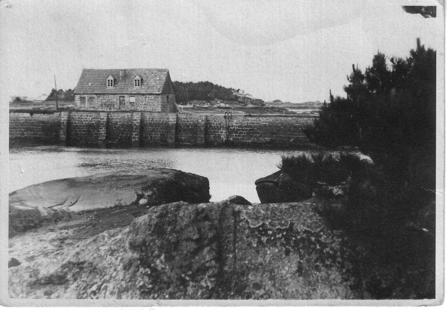 Le moulin à marée de Ploum 1re partie du 20e siècle avant sa transformation. Photo familiale